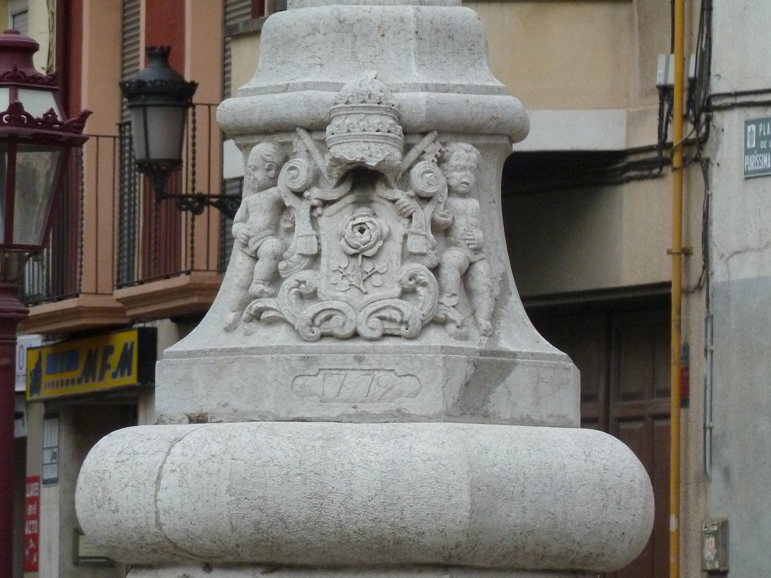 Reus